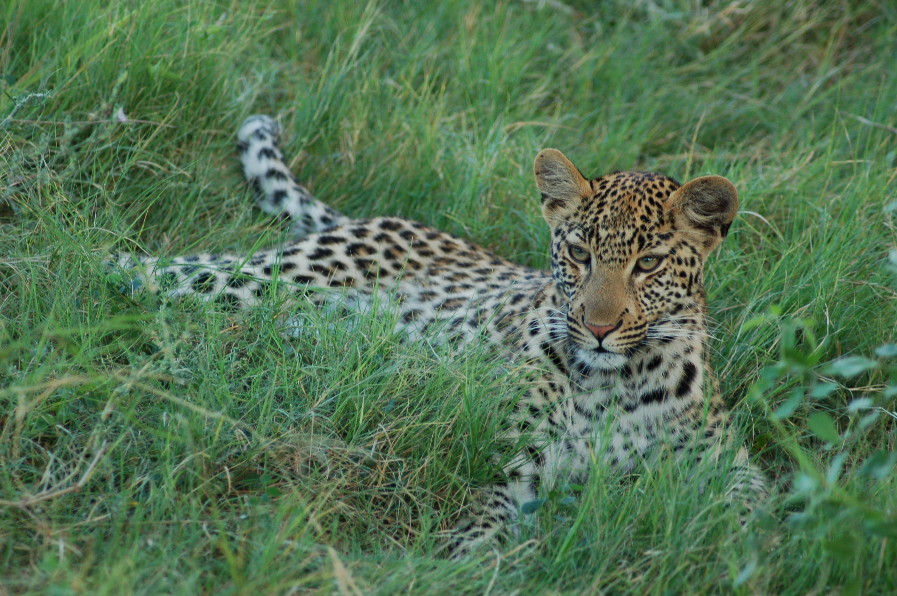 Okavango Delta, Botswana